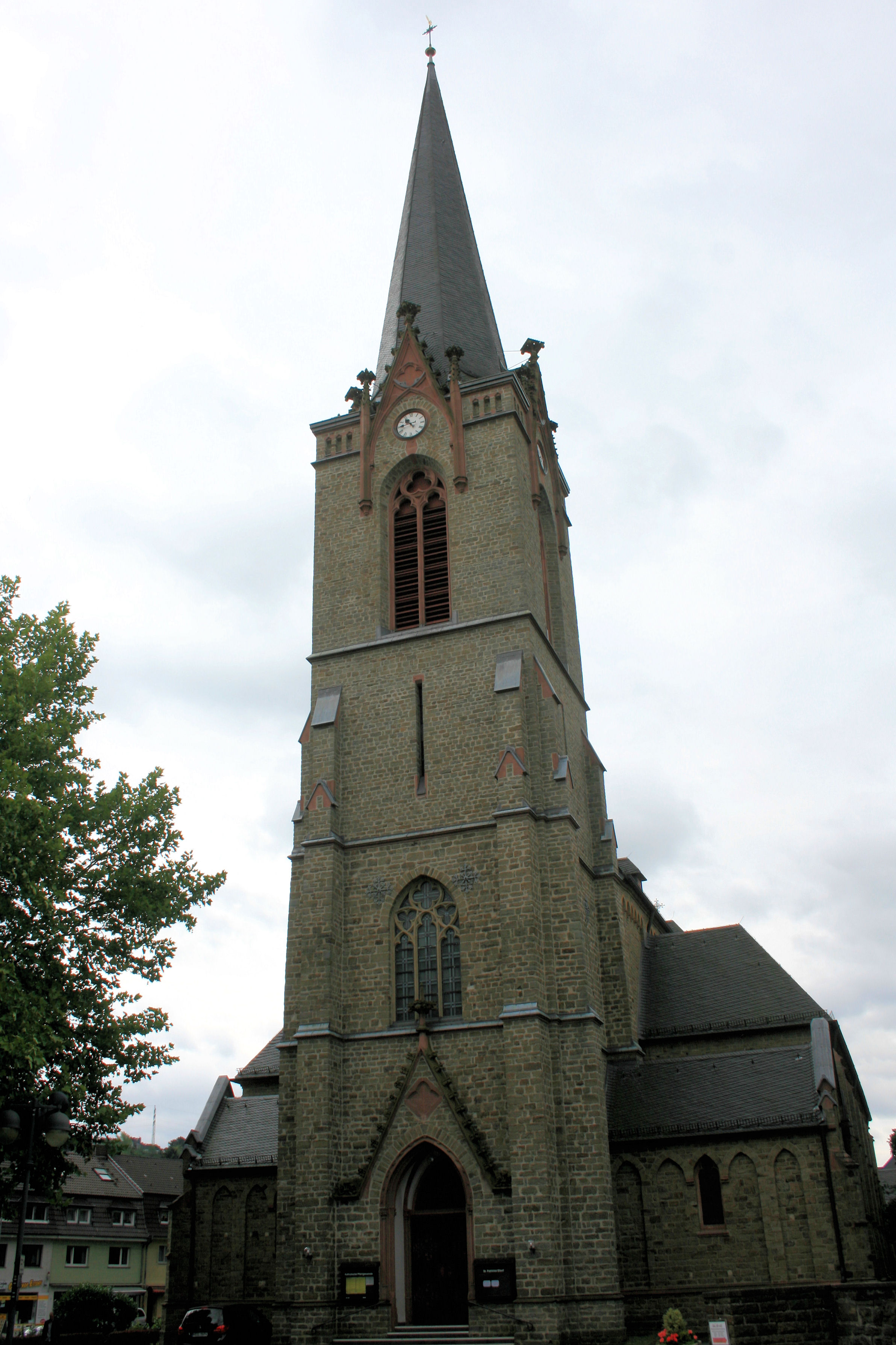 Kath. Pfarrkirche Sankt Patricius Eitorf